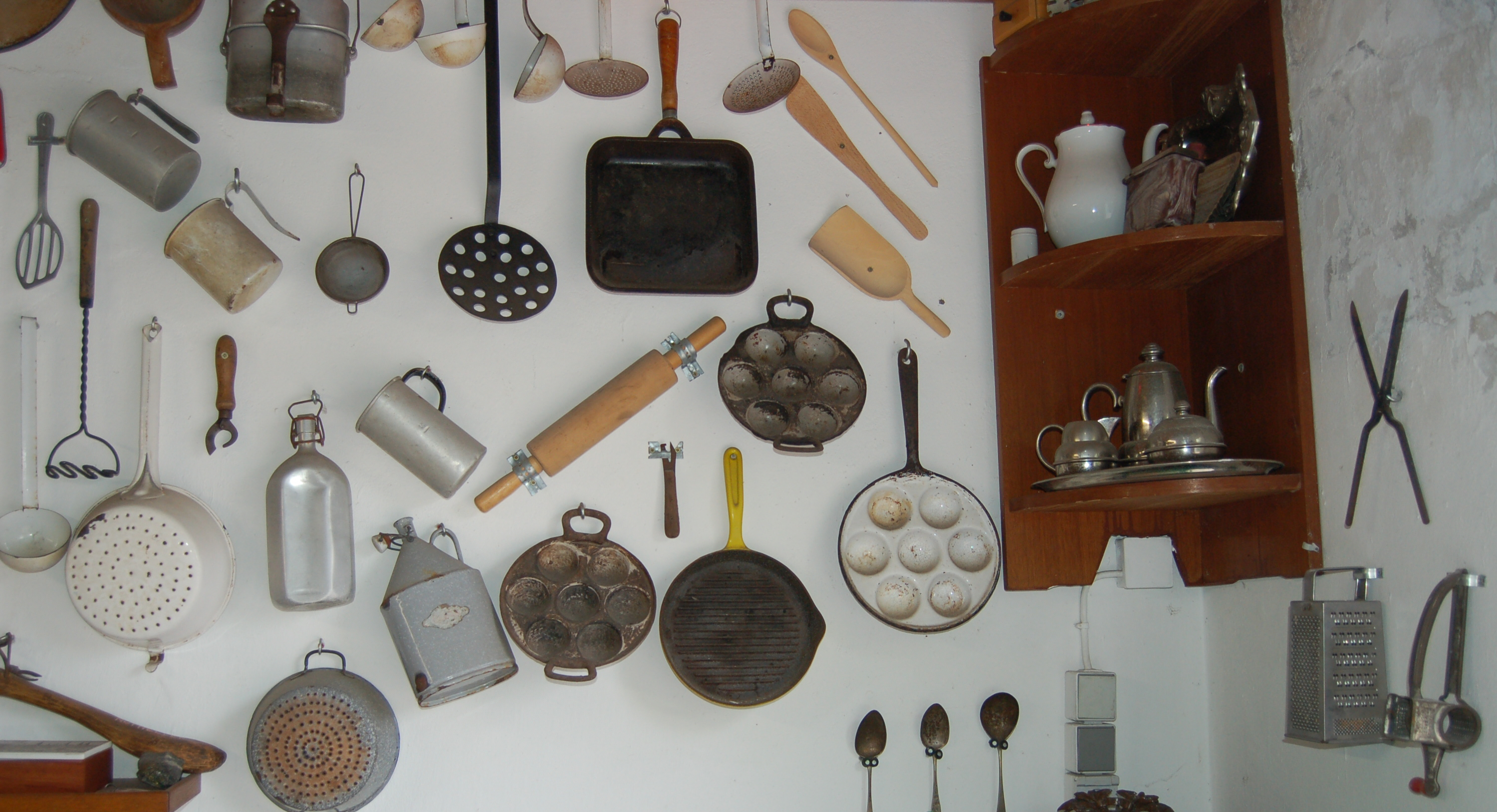 Historische Küchengeräte im Hobby-Heimat-Museum Hetlingen